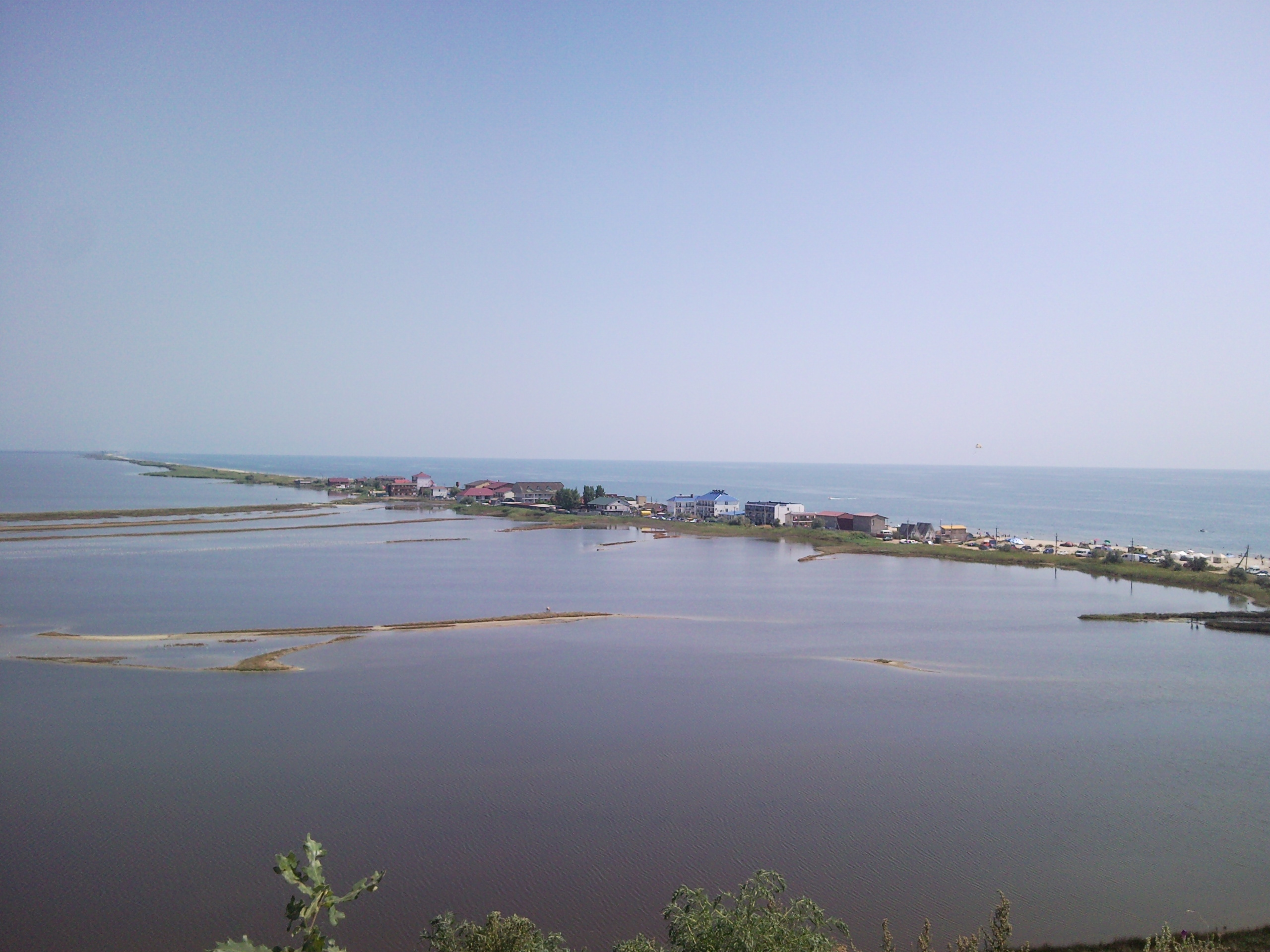 Буджацька коса Курортне